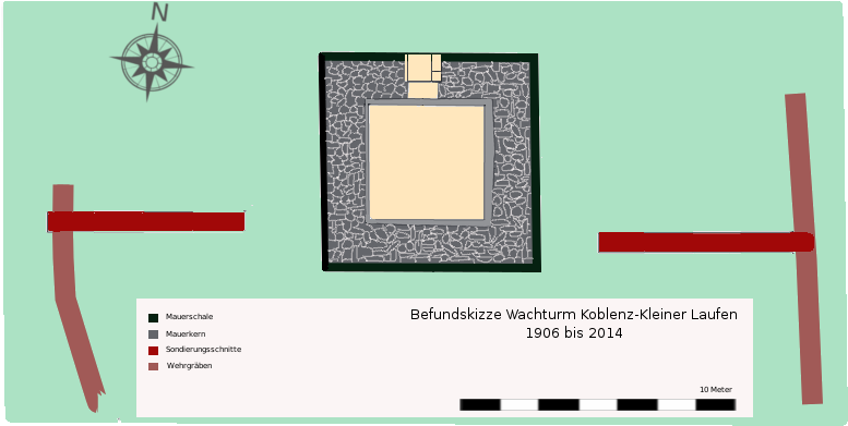 Im Rahmen der Sanierungsarbeiten neu vermessener und schematisch ergänzter Grundrissplan des spätrömischen Wachturms Koblenz-Kleiner Laufen (CH) von K. Stehlin, Befunde 1906-2014. Vorlage in: Peter-A. Schwarz: Neue Forschungen zum spätantiken Hochrhein-Limes im Kanton Aargau I. Die Wachtürme Koblenz-Kleiner Laufen, Möhlin-Fahrgraben und Möhlin-Untere Wehren. Mit Beiträgen von Sandra Ammann, Sabine Deschler-Erb, Juha Fankhauser, Lukas Freitag, Simon Jeanloz, Tina Lander und Daniel Schuhmann, Abb.10, S. 48.